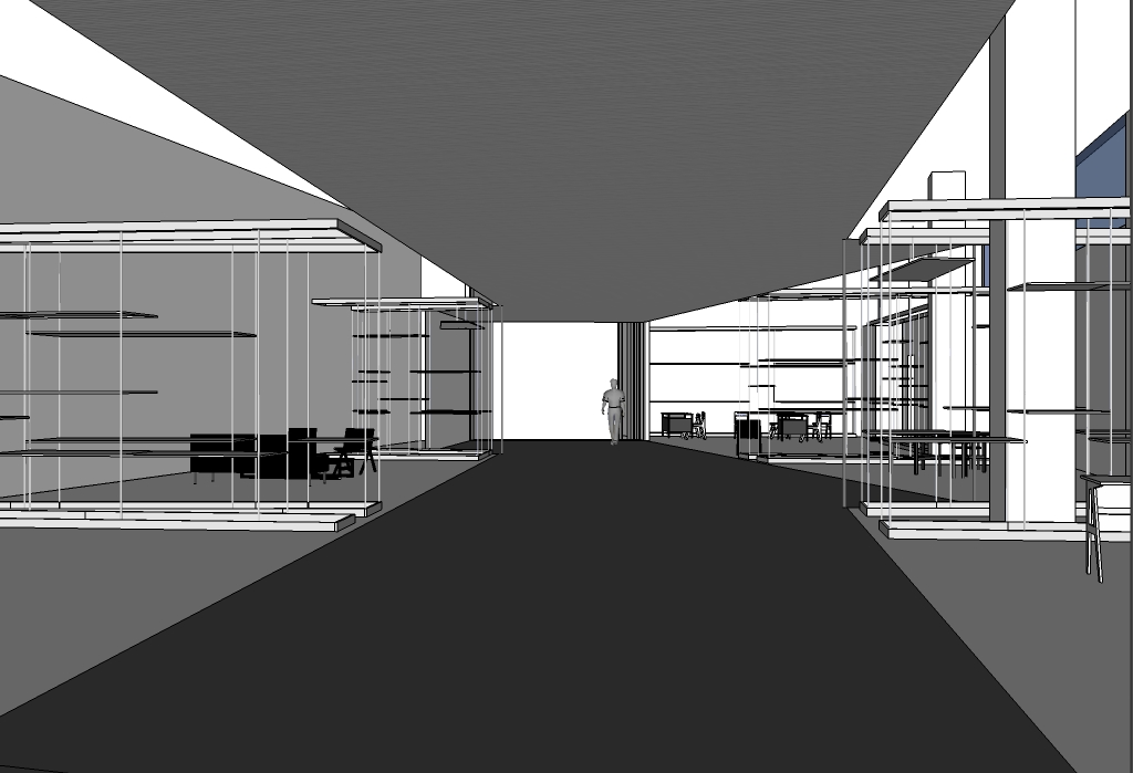 Template:ScreenshotCopyrighted